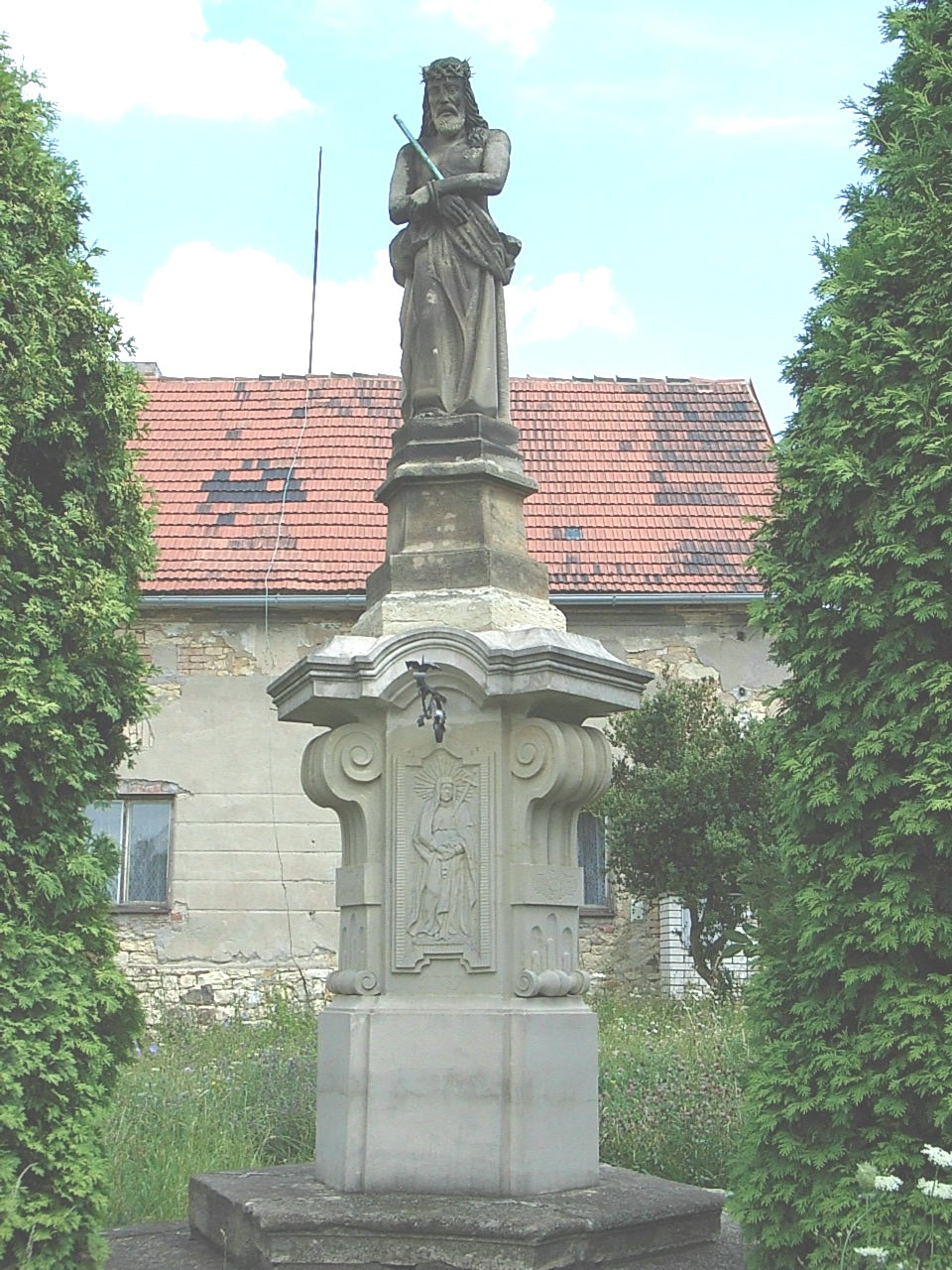 Socha Ecce homo v Rané, okres Louny.